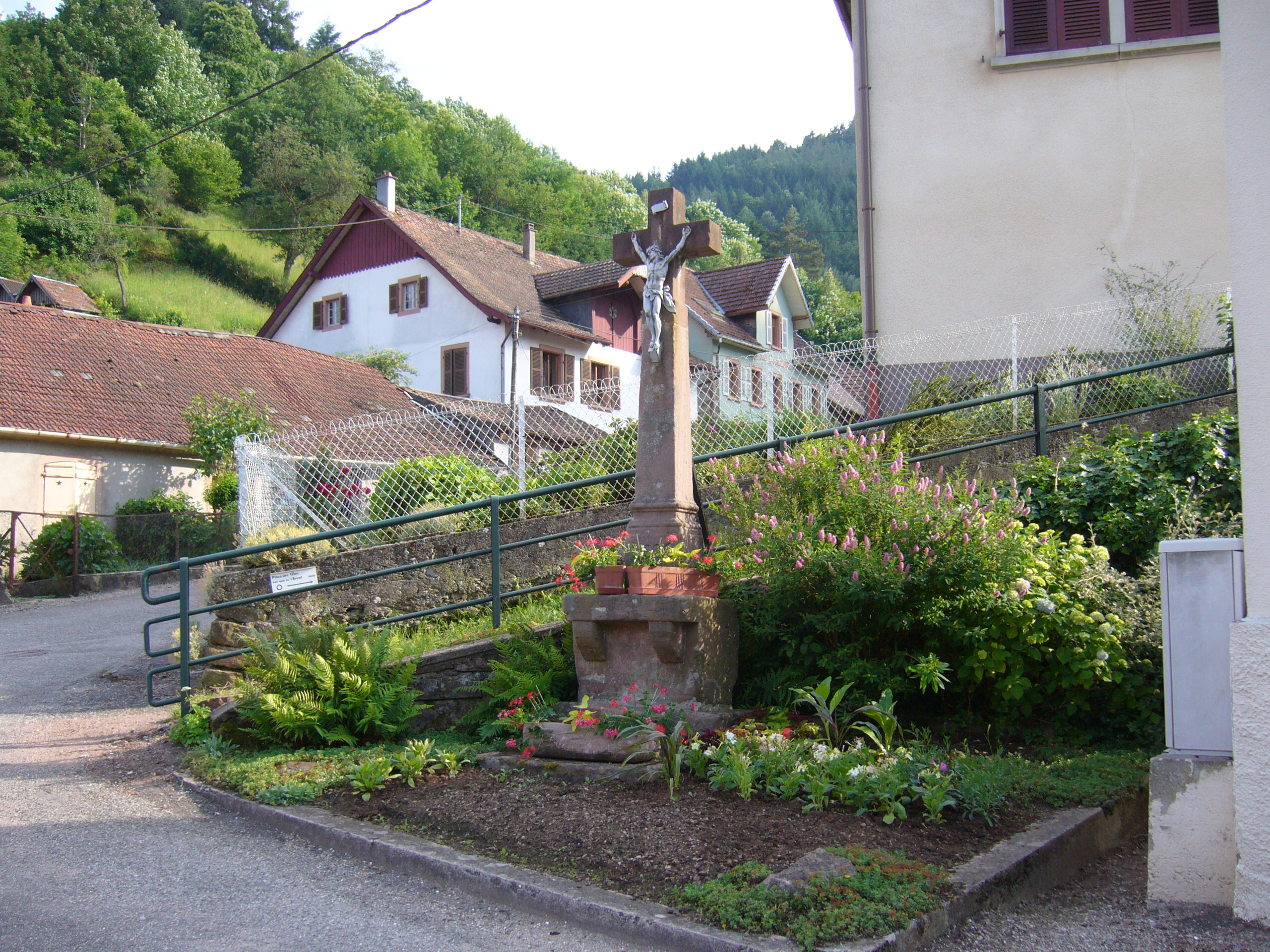 Calvaire de Hargoutte